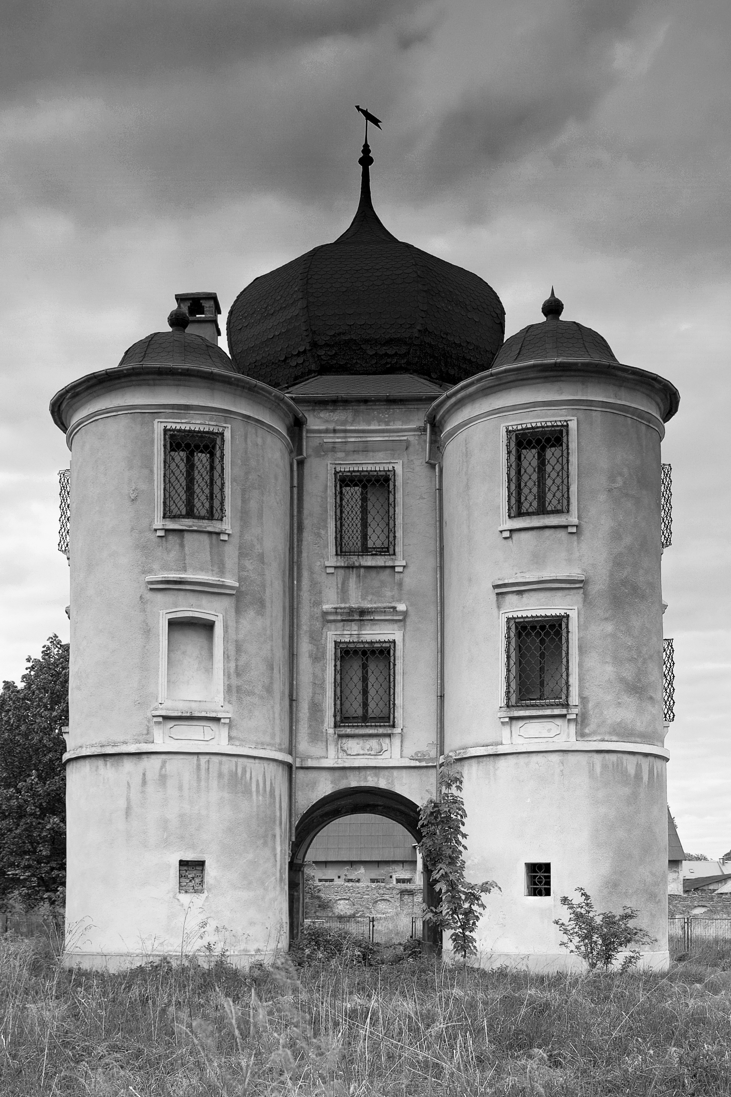 pawilon ogrodowy tzw. belweder